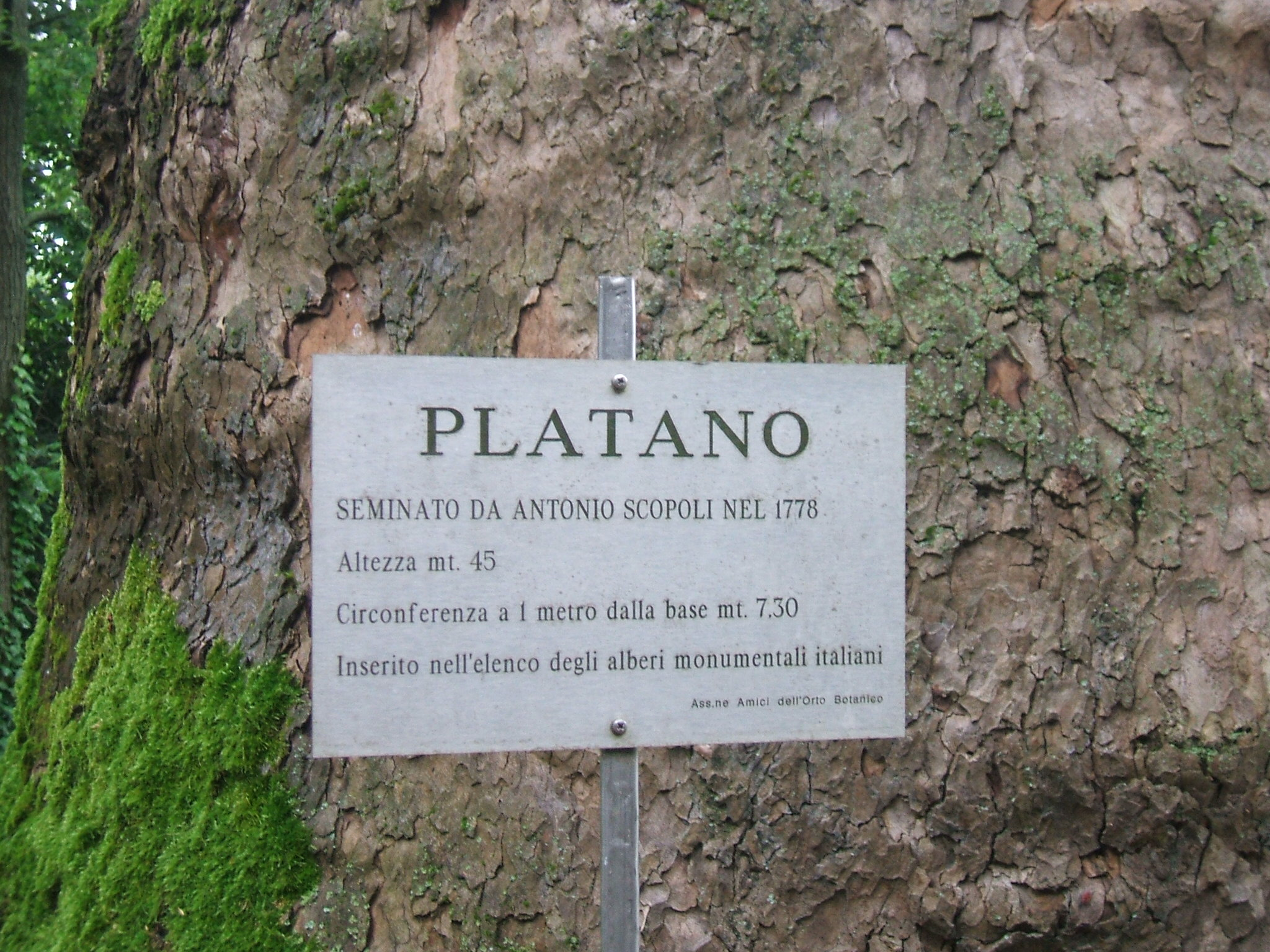 didascalia platano secolare orto botanico Pavia